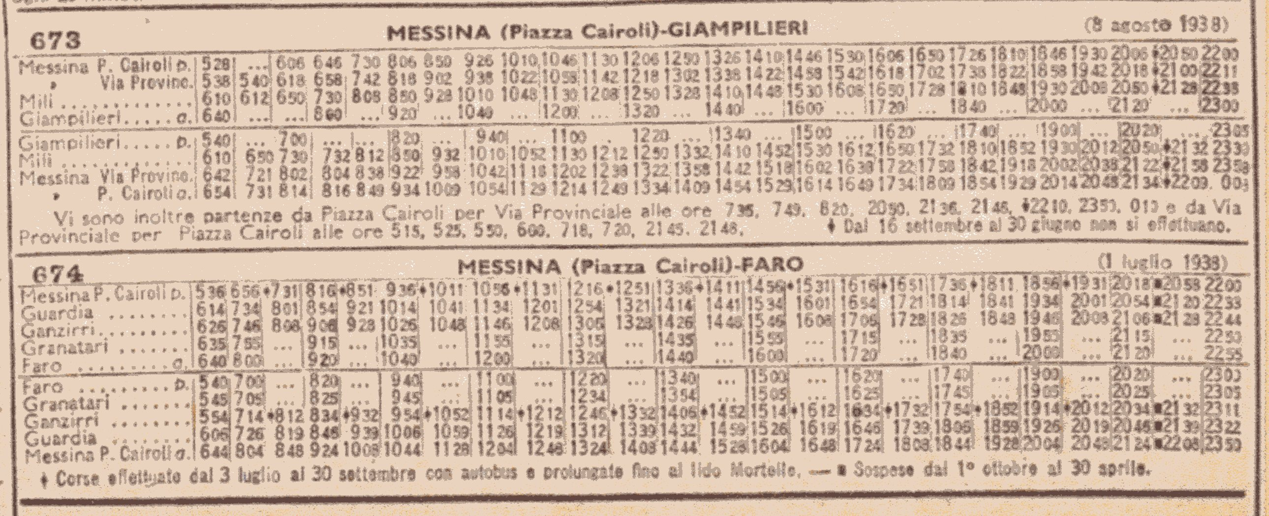 quadri orario 673 e 674 dei servizi tranviari di Messina nell'estate del 1938